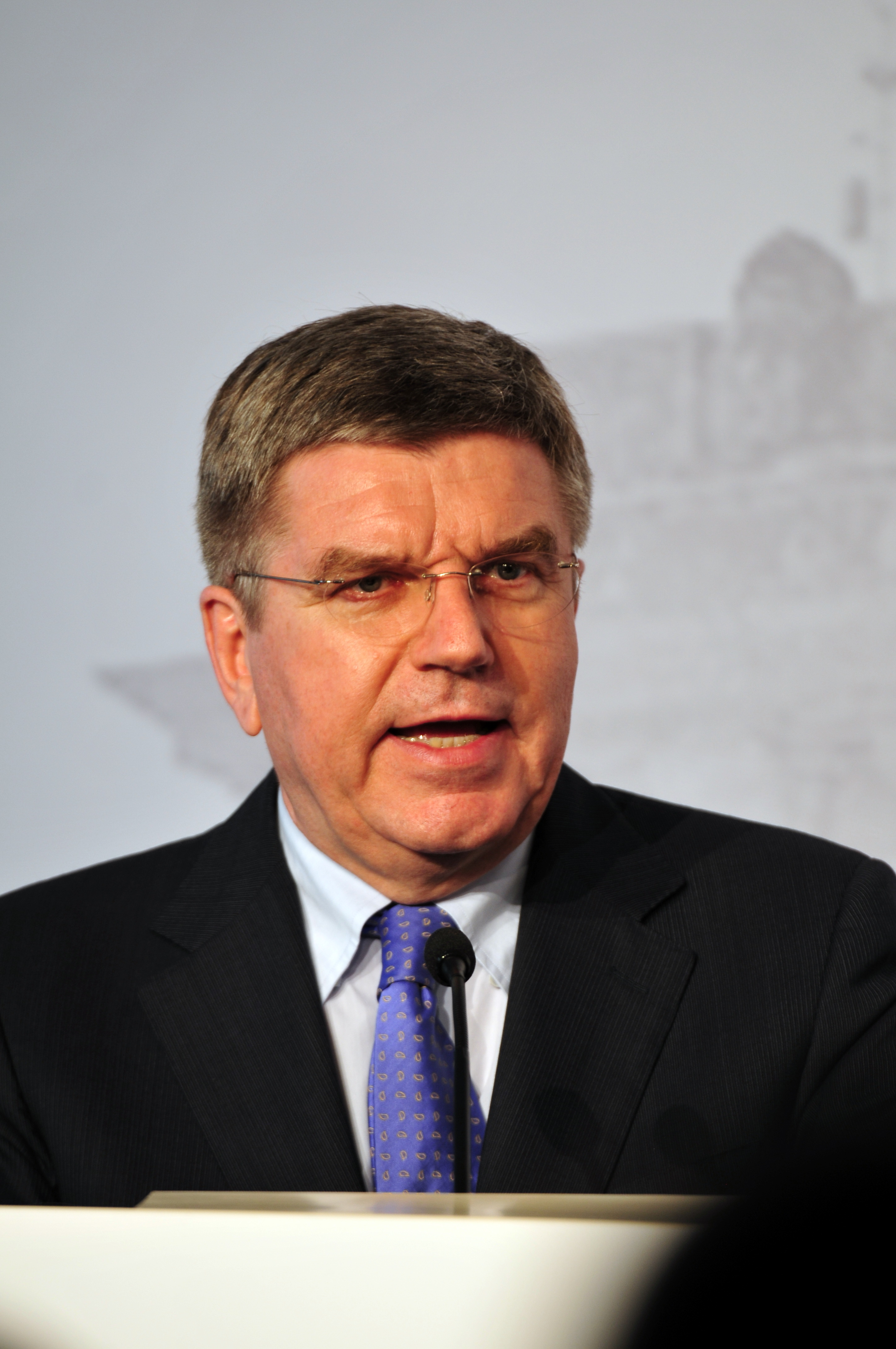 DOSB Wahlhearing 2013